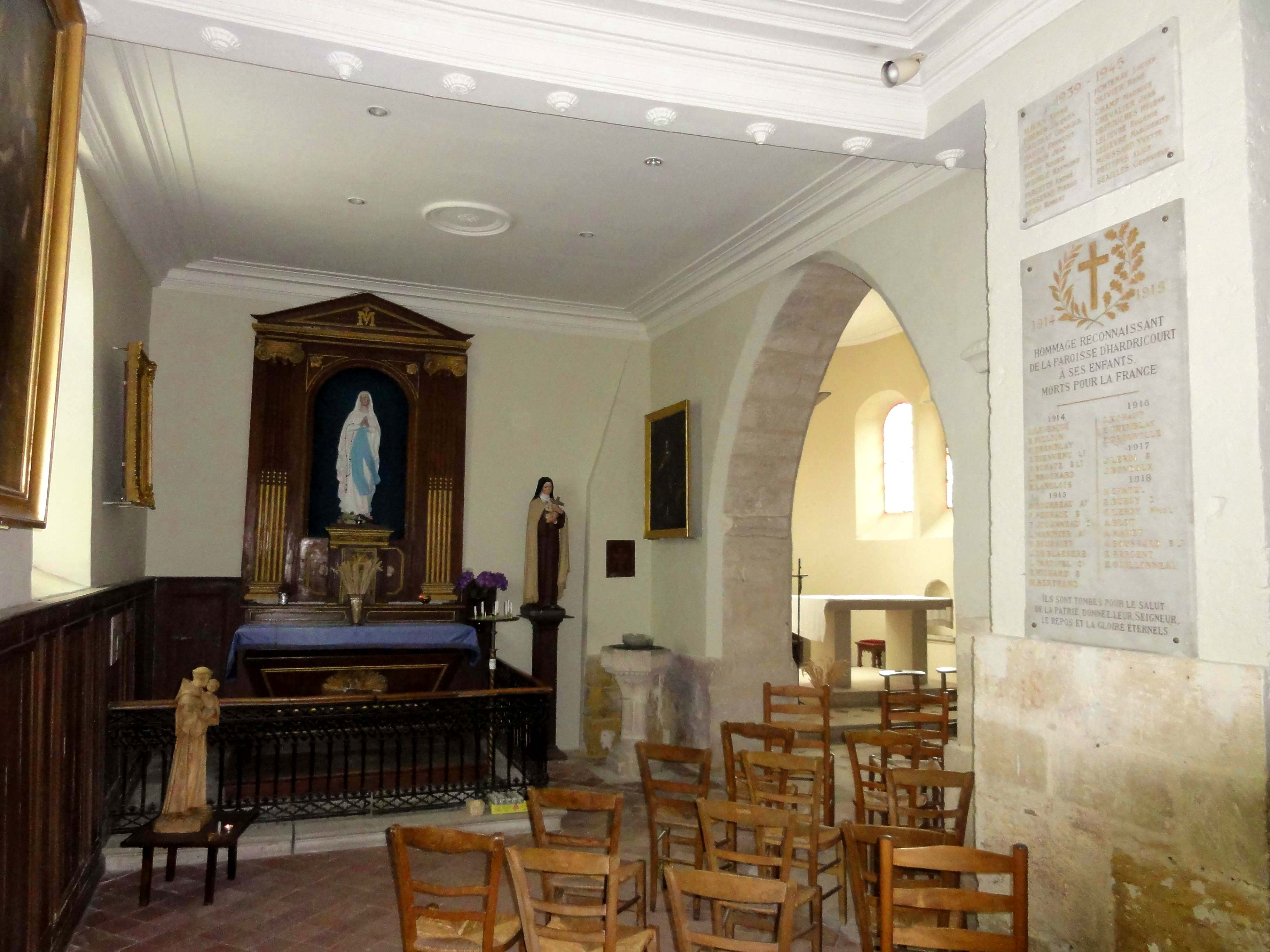 Intérieur de l'église (voir titre).